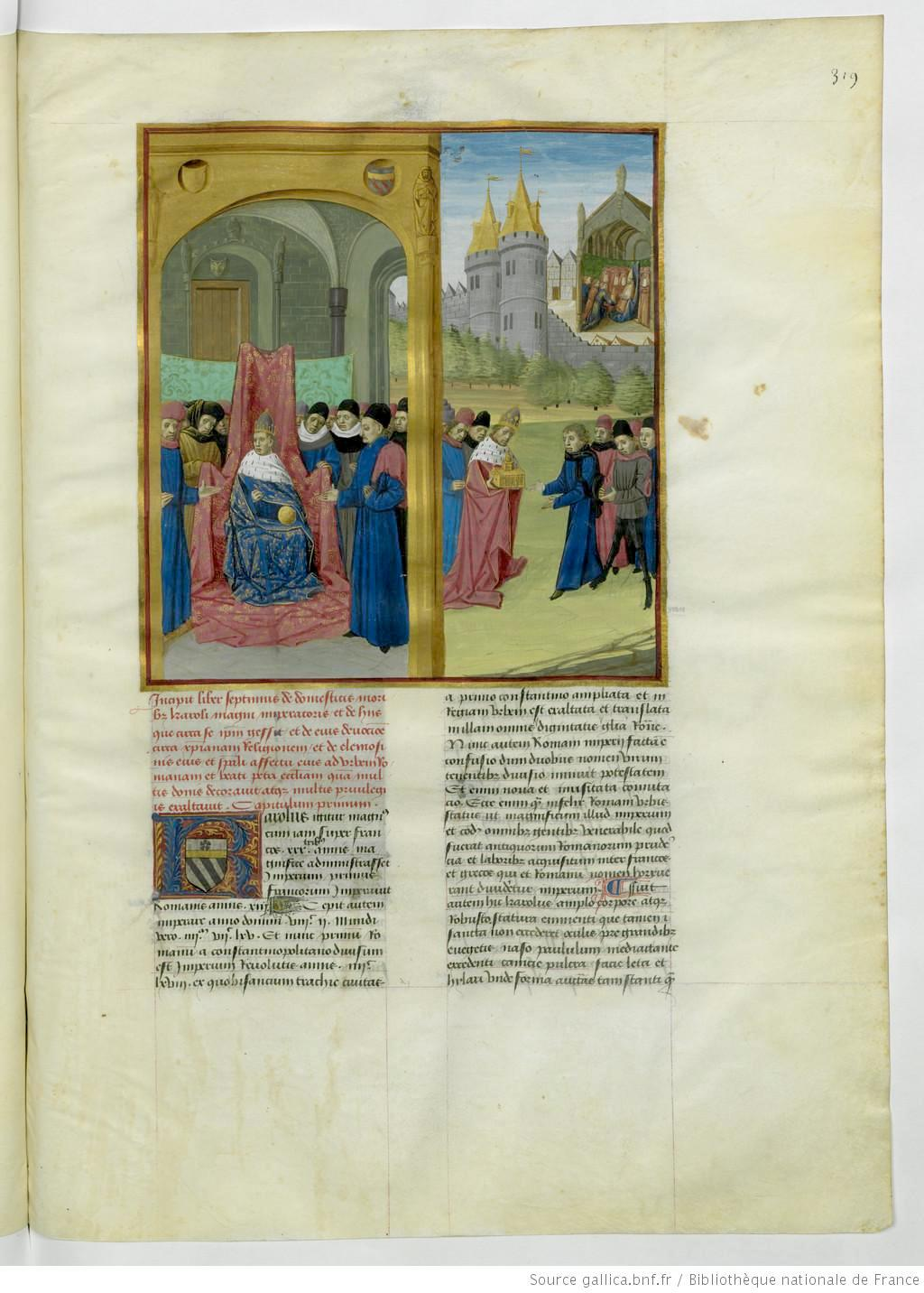 Mare Historiarum - BNF Lat4915 Fol. 319r